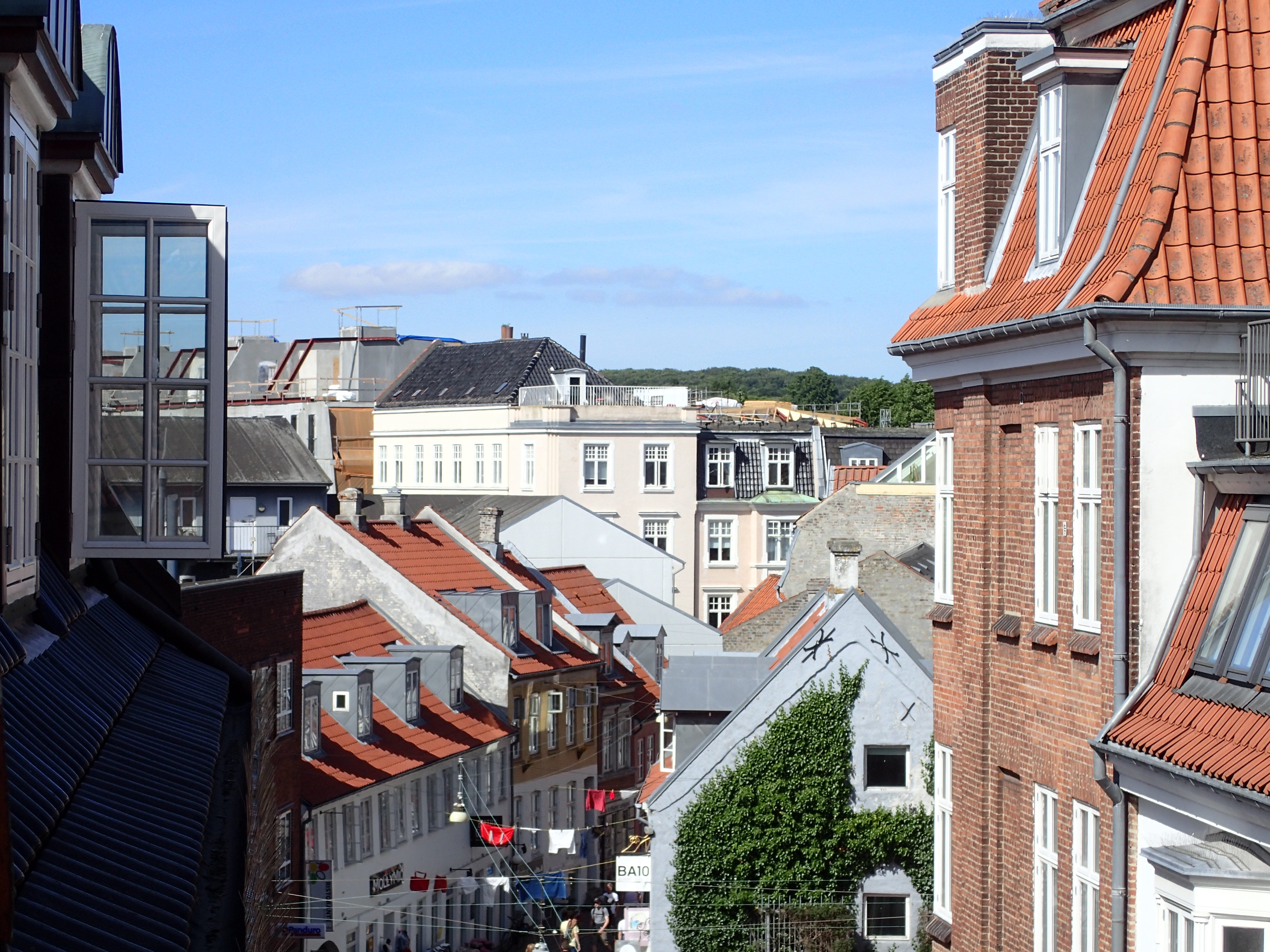 Vue over Latinerkvarteret i Aarhus.